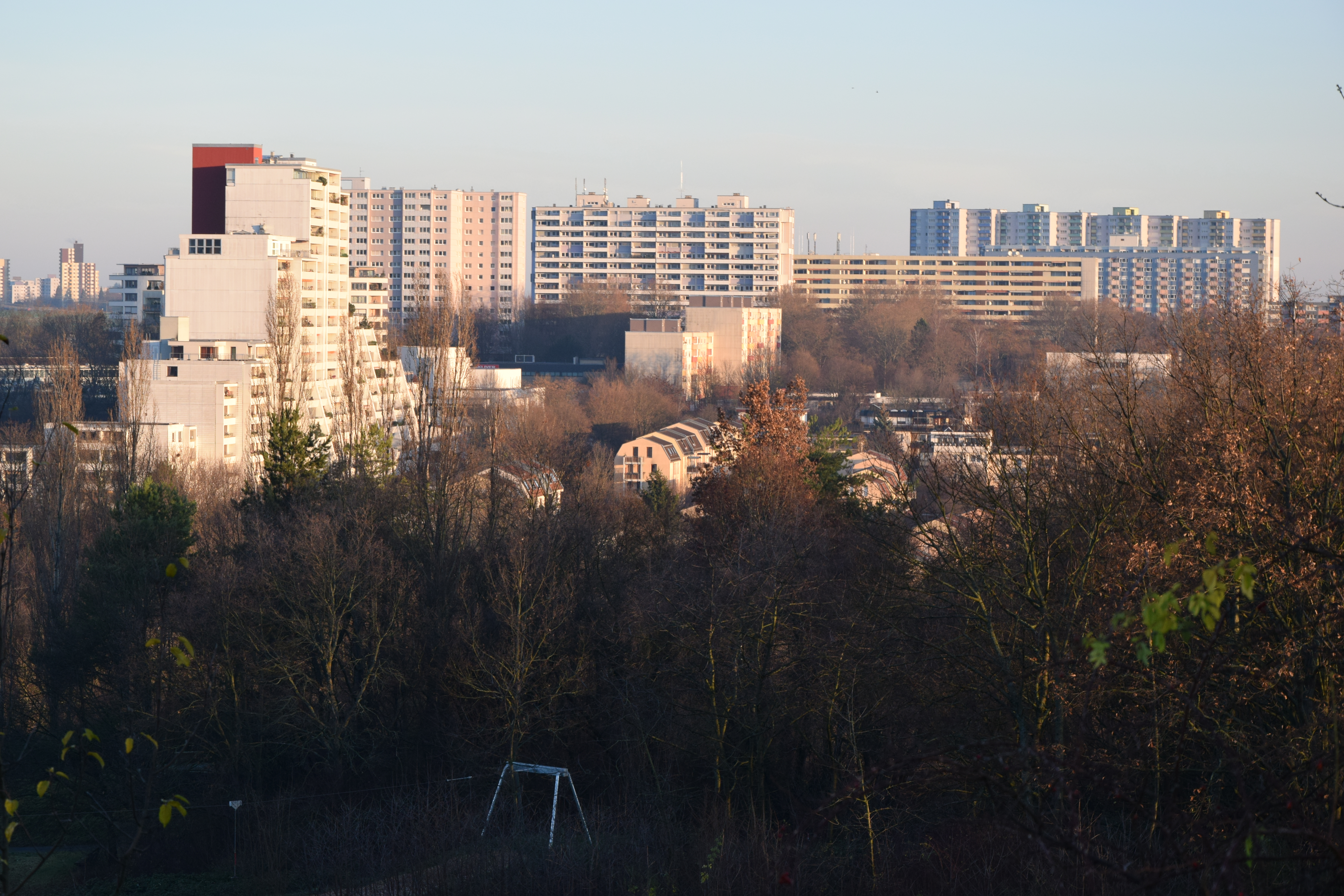 Stadtteil Stuttgart-Freiberg vom Aussichtspunkt im Tapachtal aus gesehen